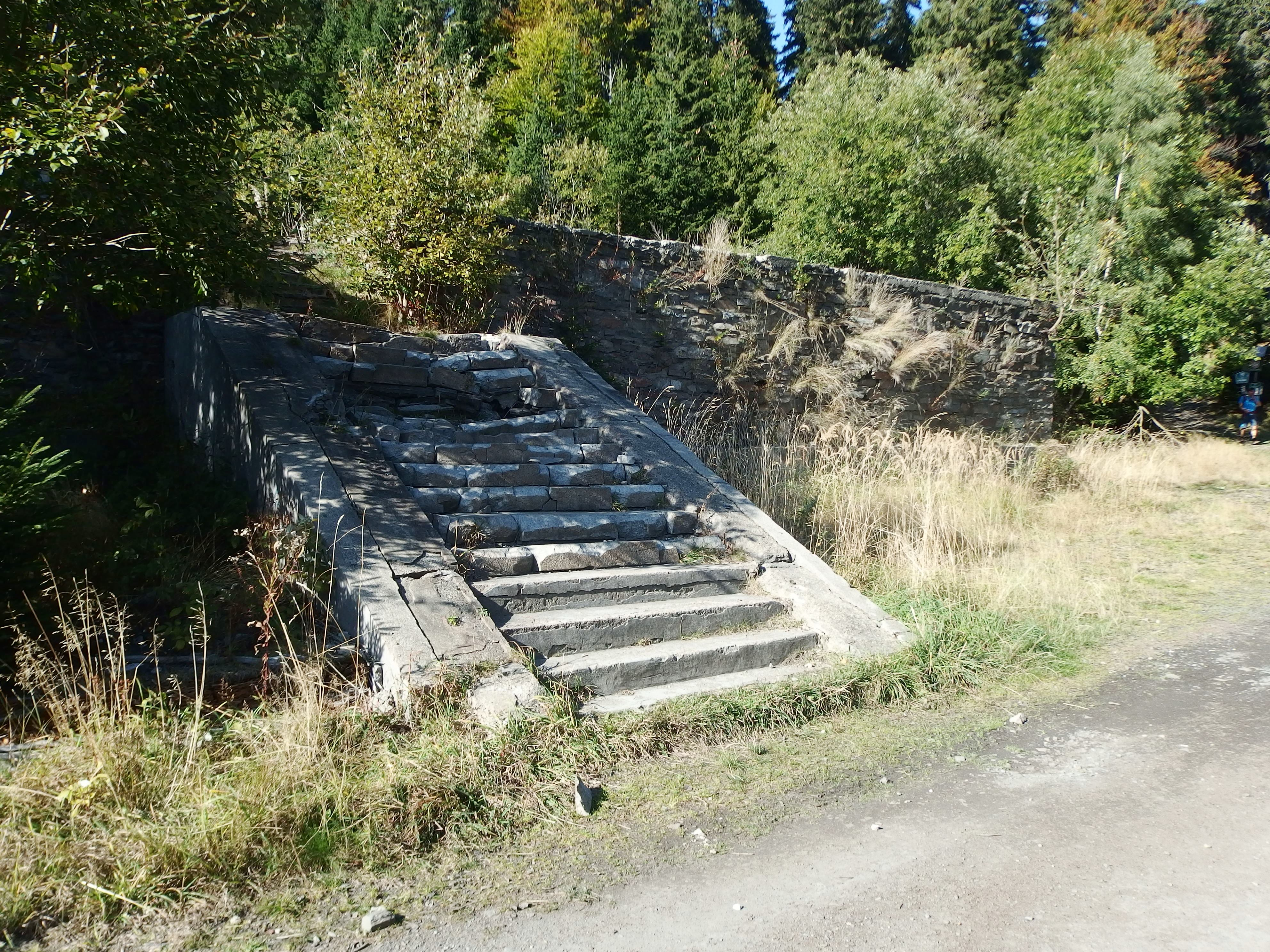 Stará Ves, okres Bruntál, bývalá chata Alfrédka, po požáru v roce 2002 zůstala neobnovena..